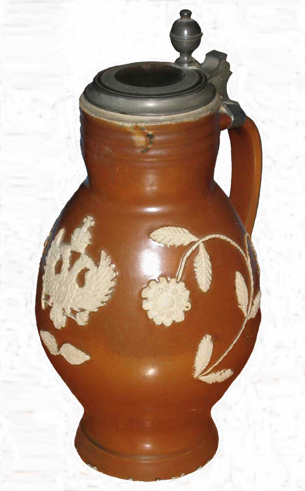 Deckelkanne mit Lehmglasur und Applikation, Bunzlau